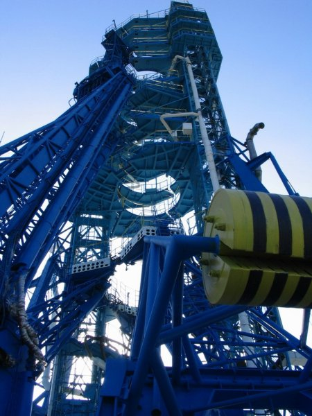 Стартовая площадка, Плесецк